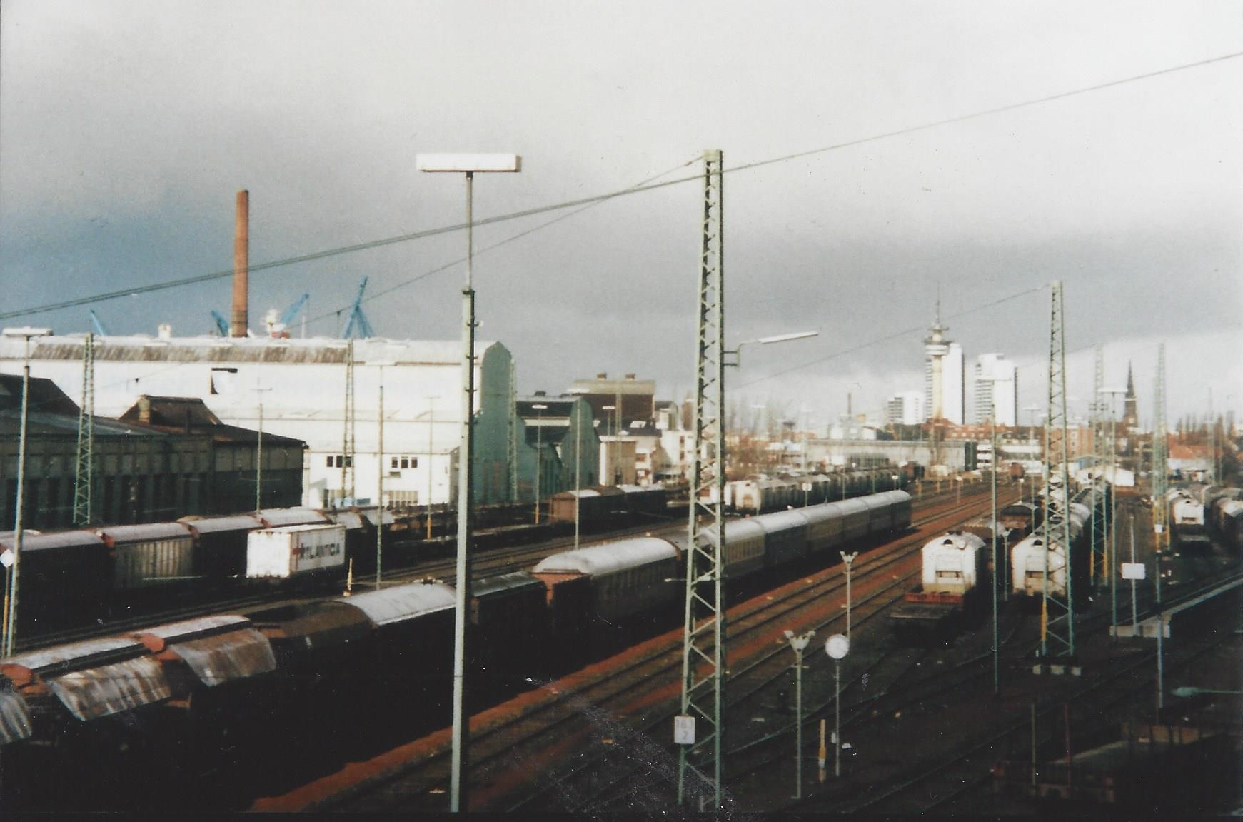 Fotografie des Güterbahnhofs Geestemünde in Bremerhaven.